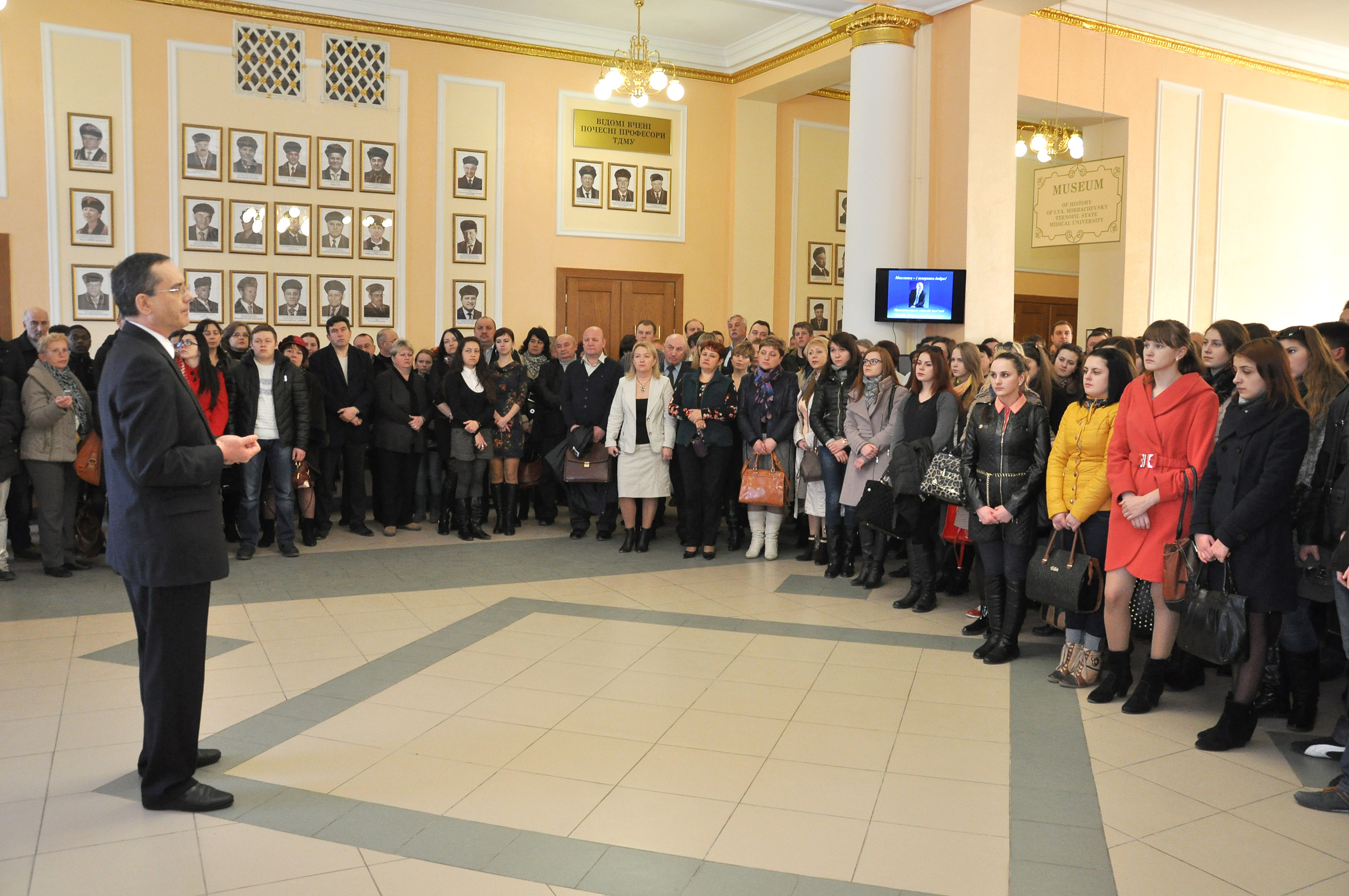 Ректор Тернопільського державного медичного університету імені І. Я. Горбачевського Михайло Михайлович Корда на відкритті Музею Леоніда Якимовича Ковальчука.